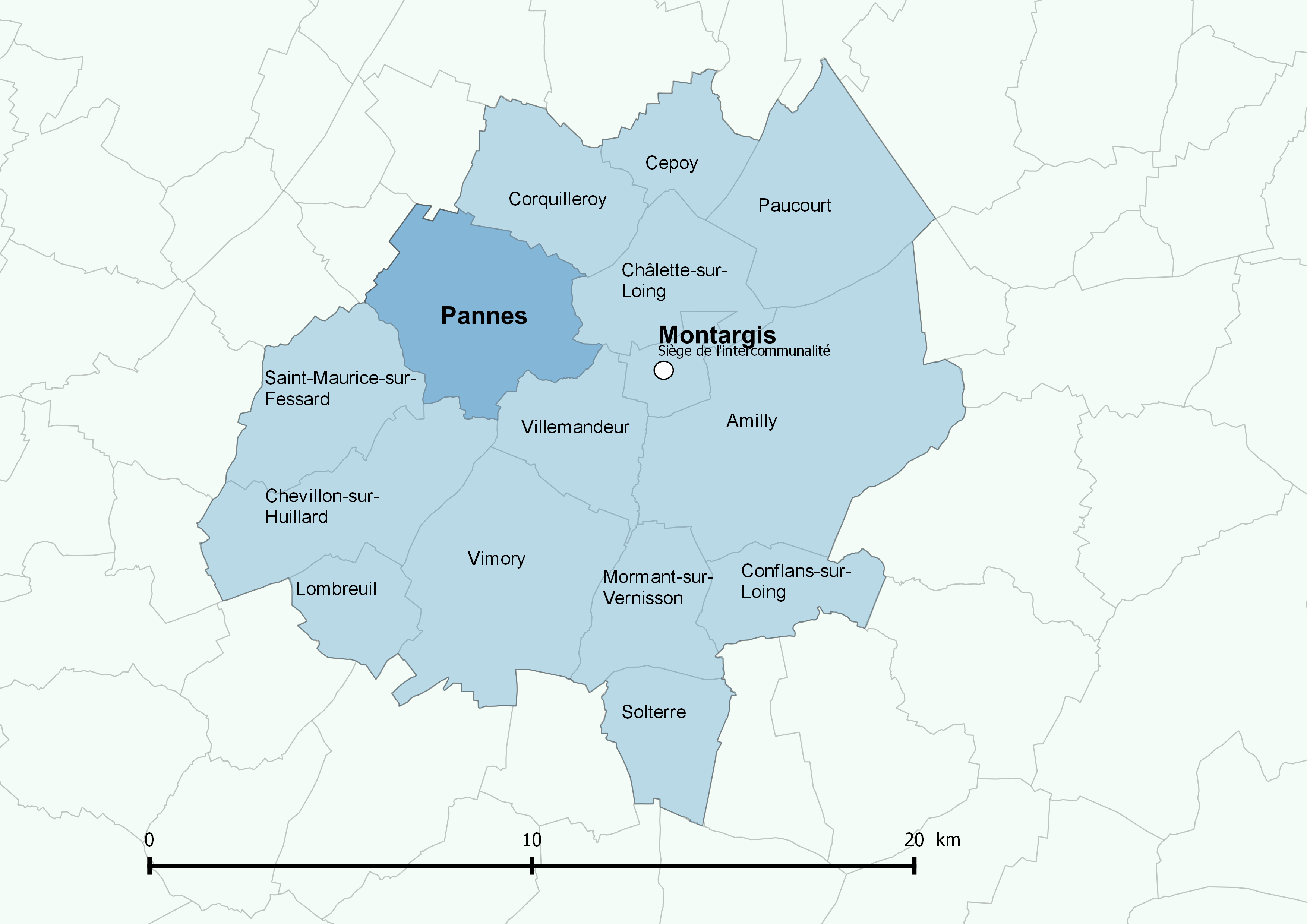 Périmètre de l'Agglomération montargoise et rives du Loing - Positionnement de la commune de Pannes